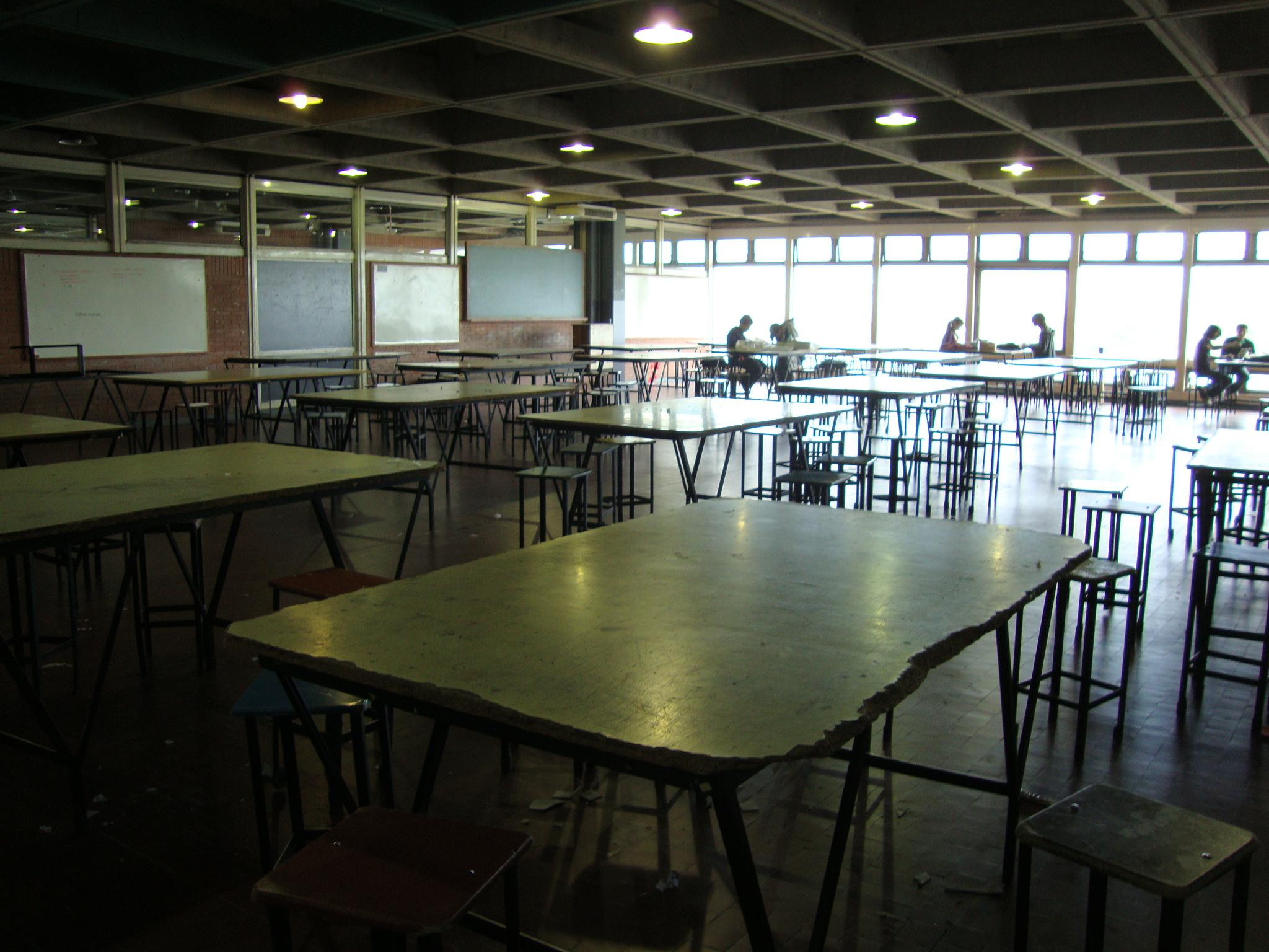 Un aula del 2º piso de la Facultad de Arquitectura, Diseño y Urbanismo de la Universidad de Buenos Aires, en el Pabellón 3 de Ciudad Universitaria. Buenos Aires, Argentina.